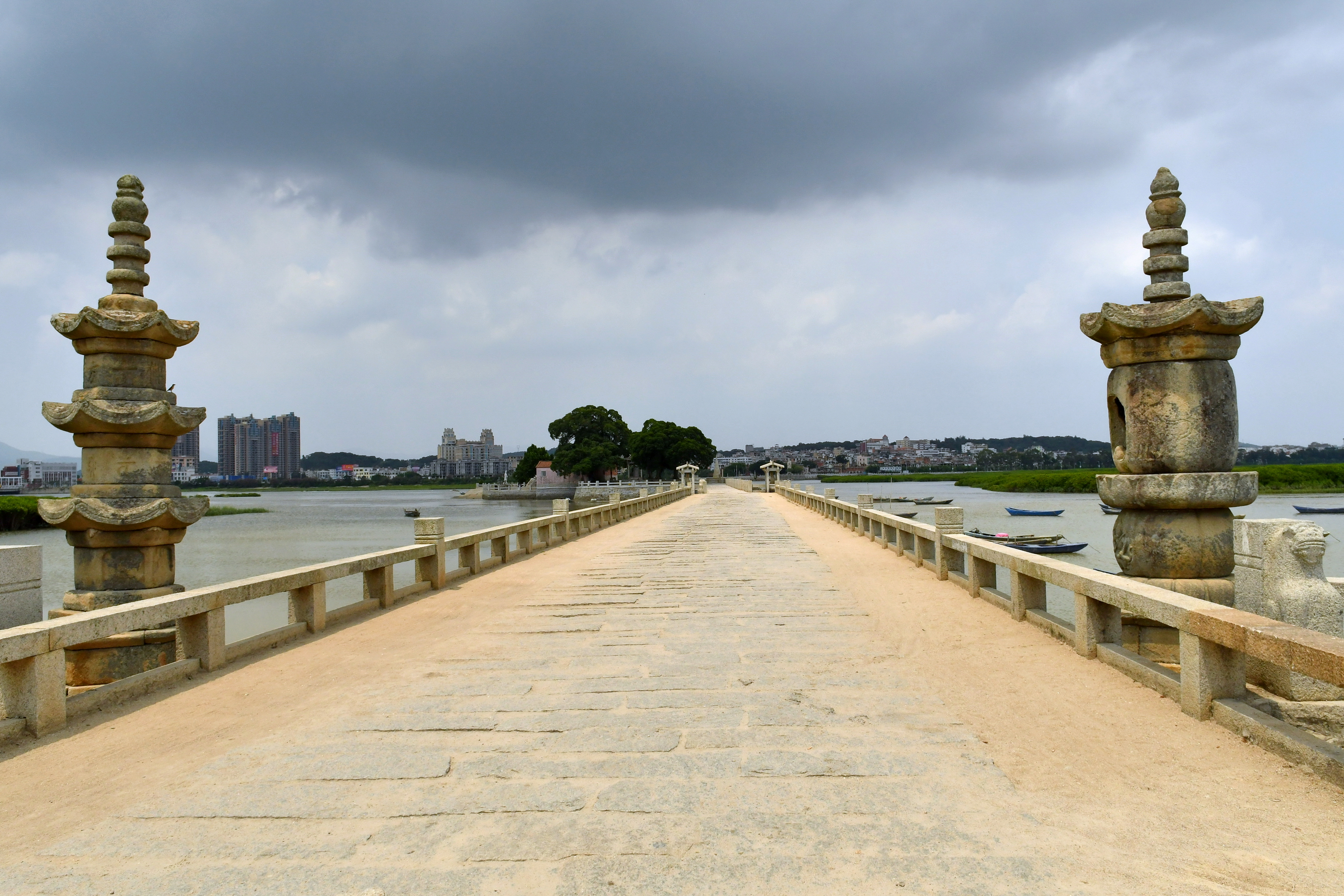 泉州洛阳桥（又名万安桥）南侧，左侧一座“楼阁式塔”，右侧一座“五轮塔”。